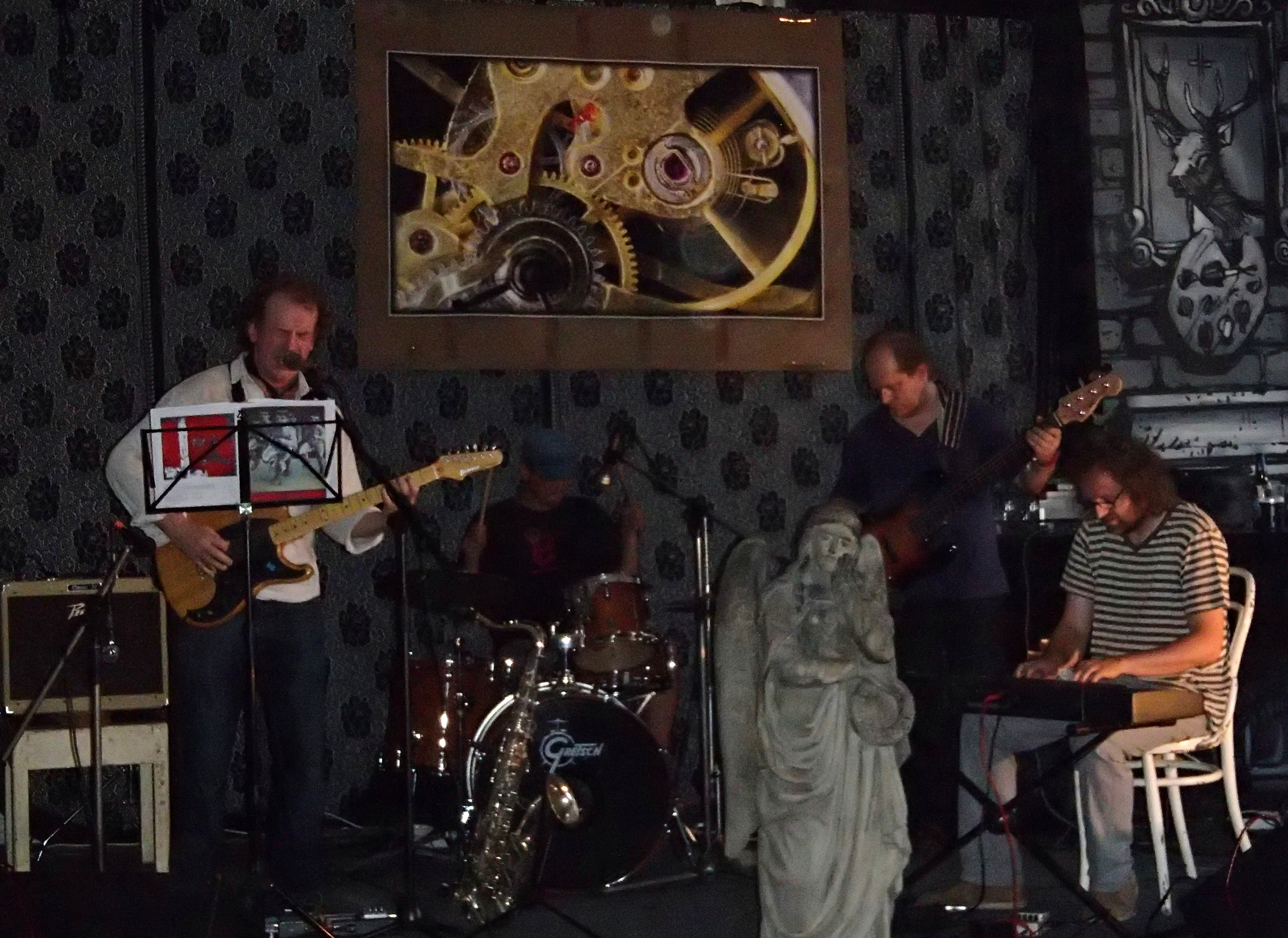 MCh band na koncertě na Popovické tvrzi v roce 2013